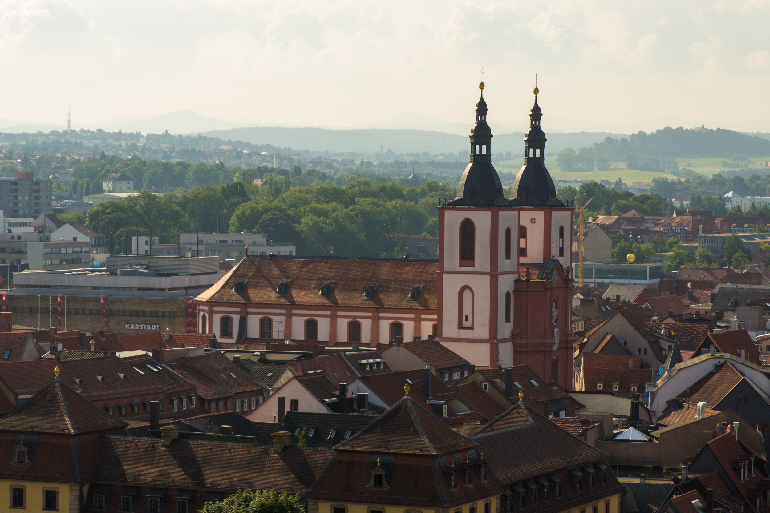 Blick vom Südturm des Fuldaer Doms